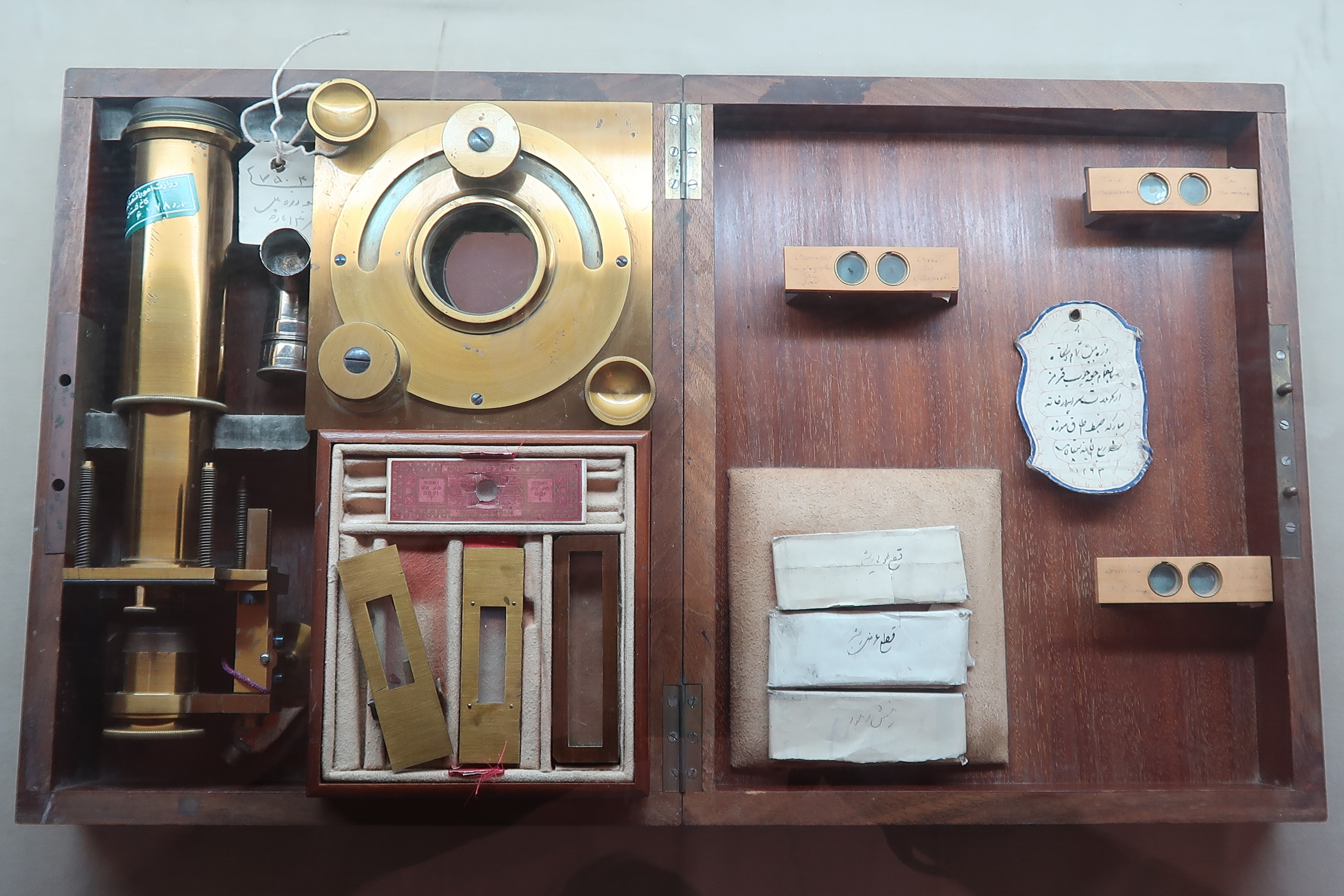 میکروسکوپ متعلق به ناصر الدین شاه قاجار